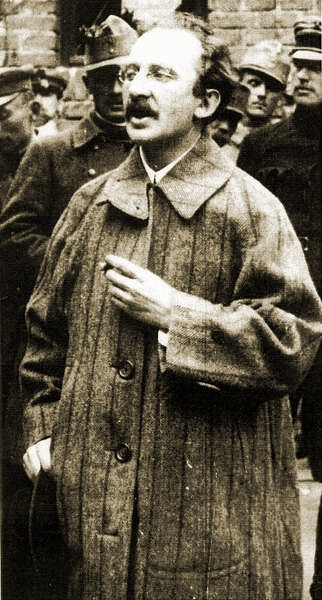 Lukács György népbiztos 1919-ben a vörös terror idején